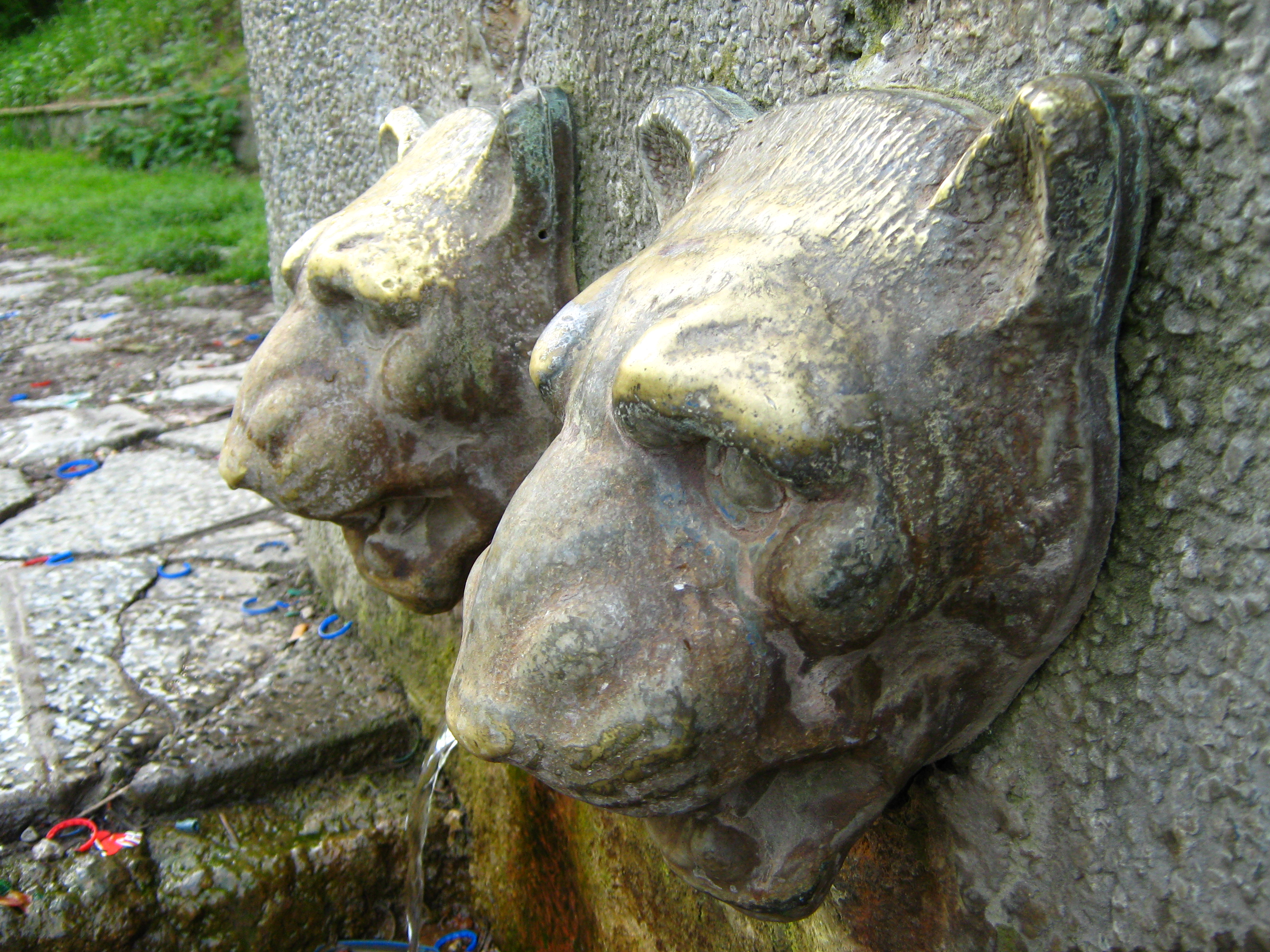 Kiseljak banja vrucica